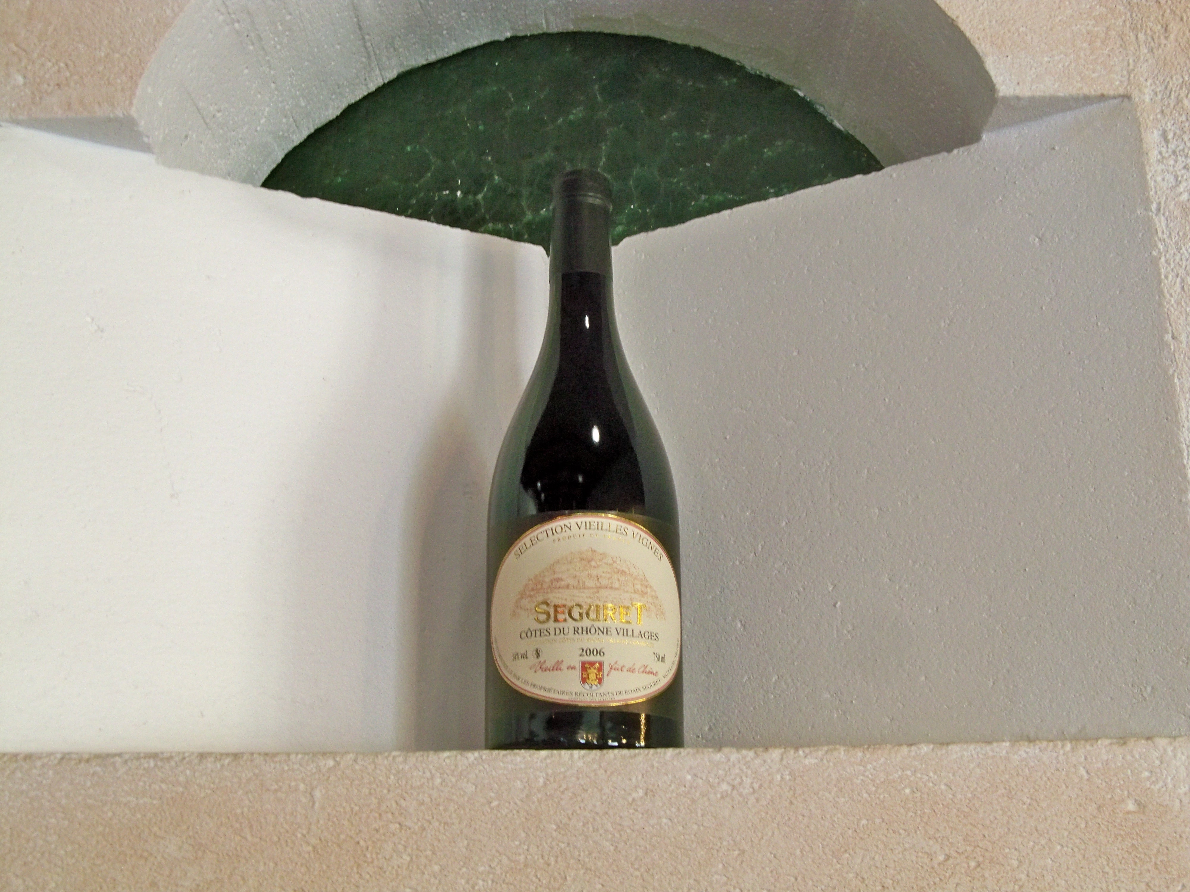 Bouteille de vin de Séguret AOC, Vaucluse